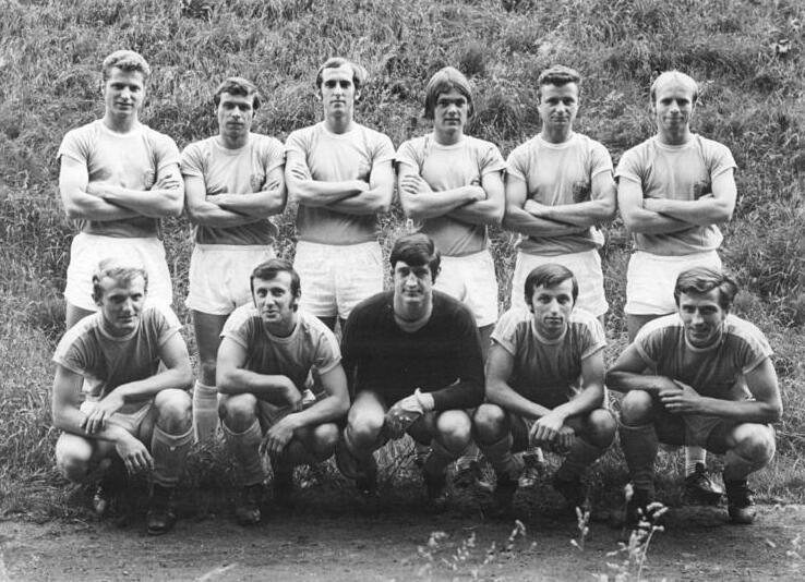 Zentralbild-Liebers-8.6.71-ma-Karl-Marx-Stadt: Aufsteiger zur Oberliga. In der Südstaffel der Liga belegte der FC Karl-Marx-Stadt mit 50:10 Punkten und 72:16 Toren überlegen Platz 1 und erkämpfte sich damit den Wiederaufstieg in die DDR-Fußball-Oberliga. Stehend von links: Sorge, Zeidler, Wolf, J. Müller, Erler und Dost. Vorn von links: Lienemann, Schuster, Torwart Lang, Neubert und Franke.